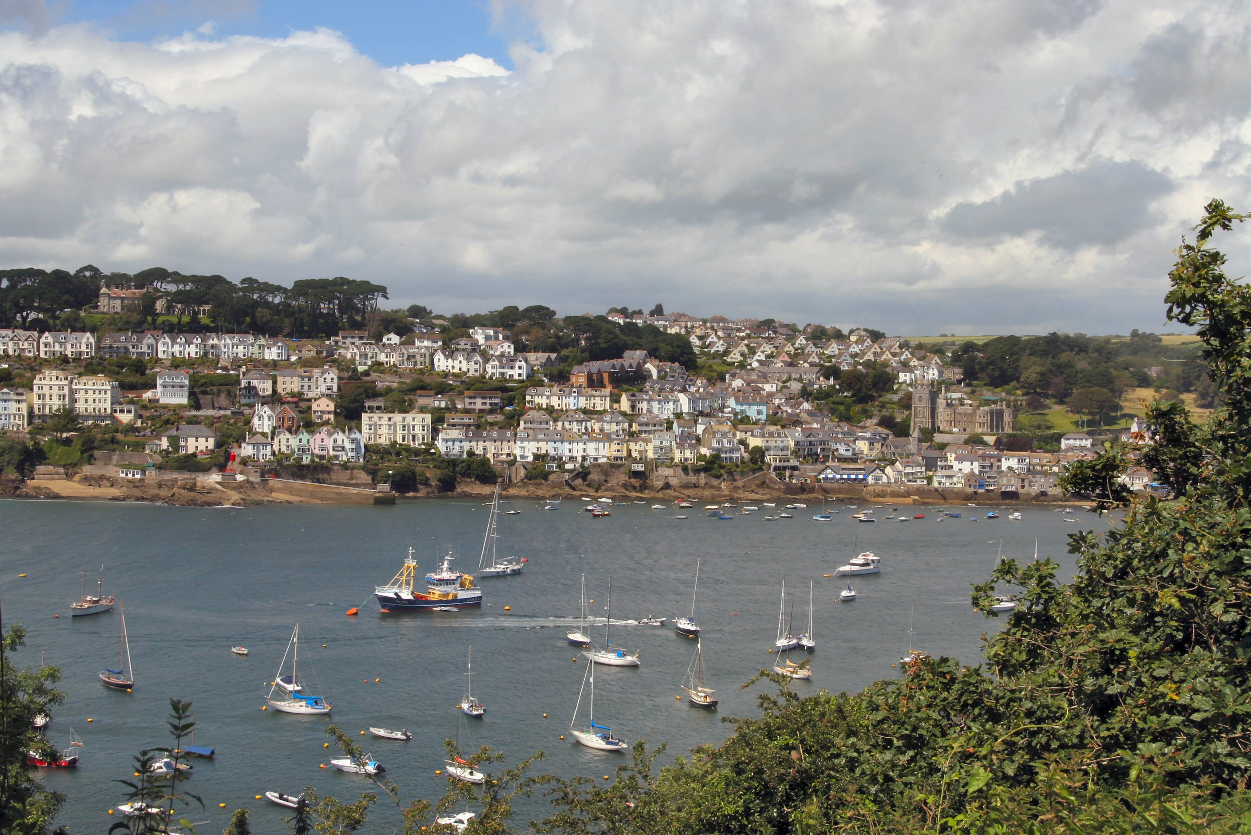 Fowey von Polruan aus gesehen